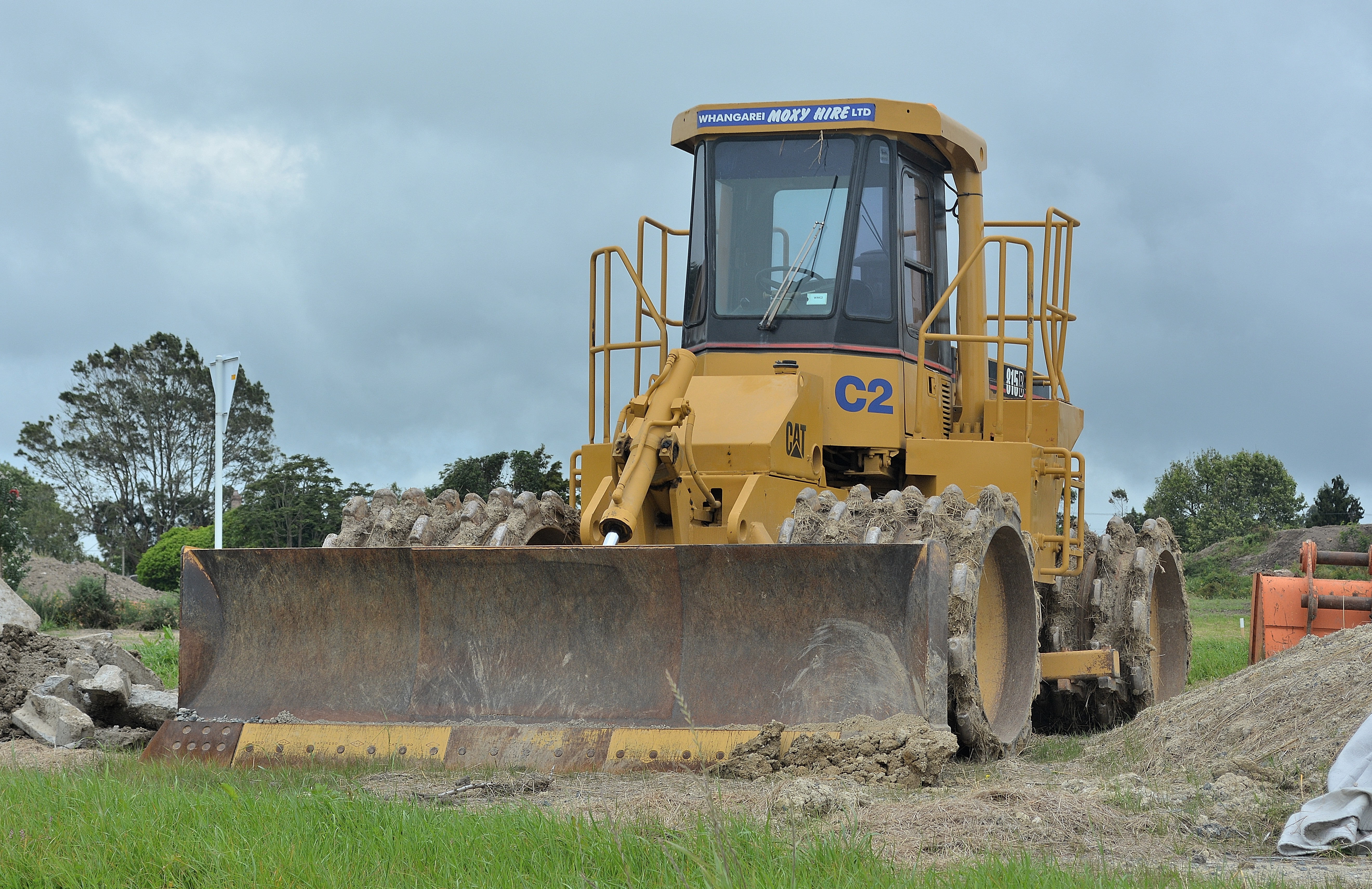 Riverhead,West Auckland.New Zealand